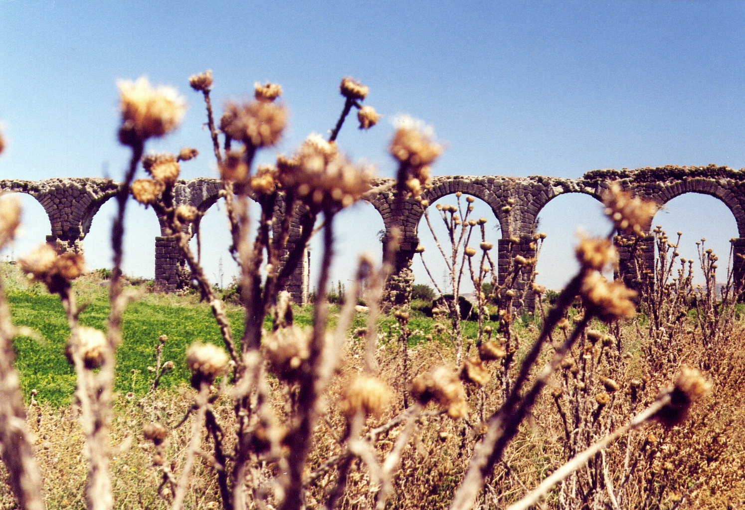 Aquädukt in Epiphaneia, Südtürkei